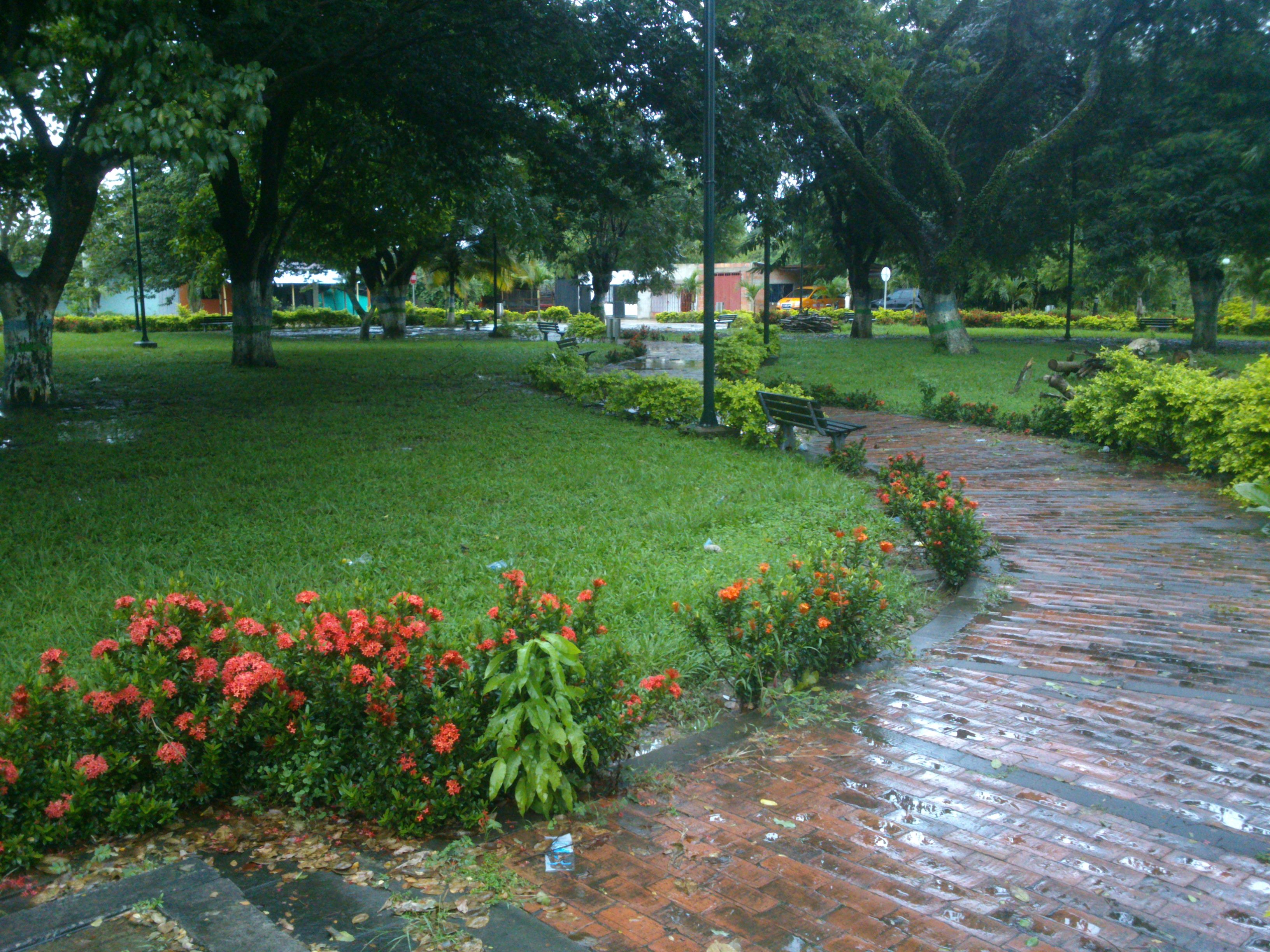 Ubicación: PUERTO RONDON, ARAUCA